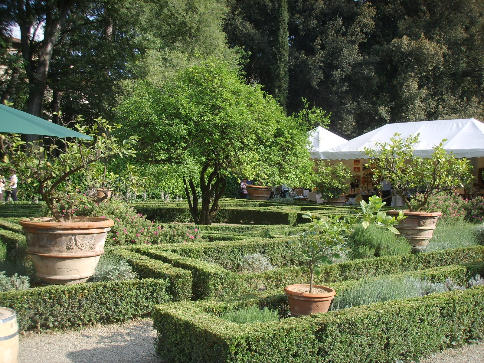 Giardino corsini, aiuole